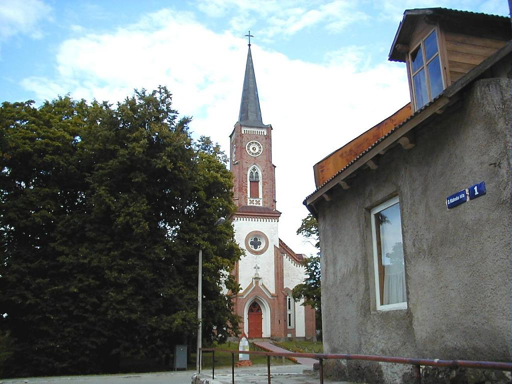 Lubānas luterāņu baznīca 2001-08-25